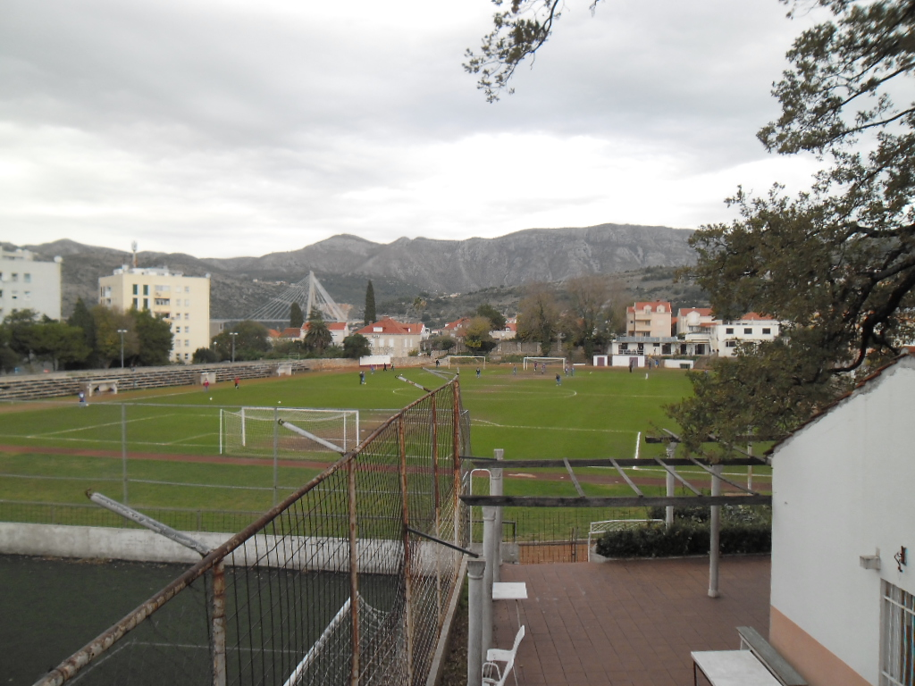 nogometni stadion GOŠK-a u Lapadu, Dubrovnik